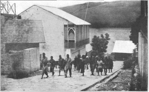 men in chain in Matadi, Congo, 1907